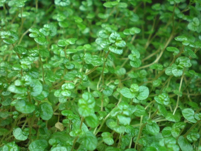 Soleirolia soleirolii leaf